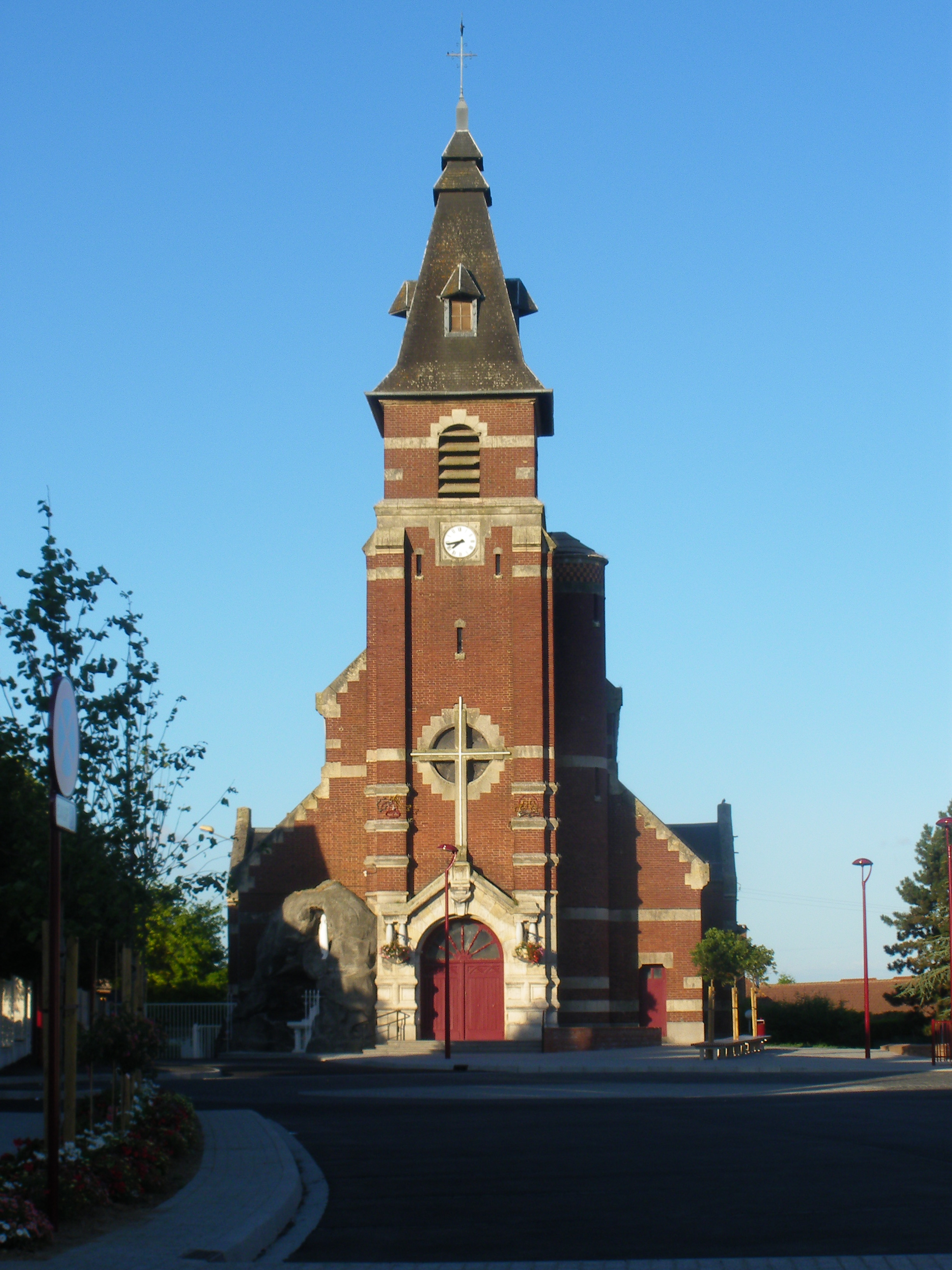 Vue de l'église Saint-Martin d'Auchy-les-Mines dans le Pas-de-Calais.